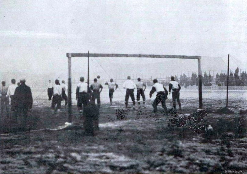 Équipe du Club français, le 26 décembre 1897. Rencontre contre les English Ramblers au vélodrome du Parc des Princes.